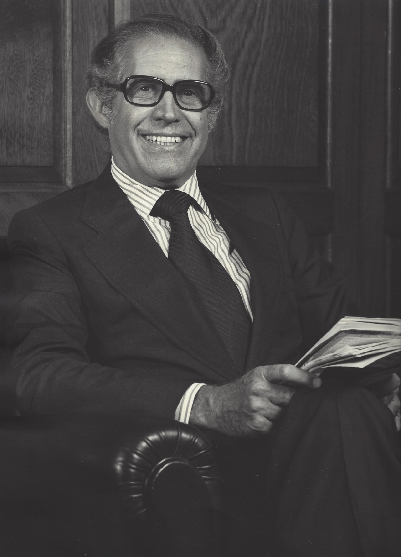 Celso da Rocha Miranda, um dos maiores empresários do Brasil, perseguido político durante a Ditadura Militar.